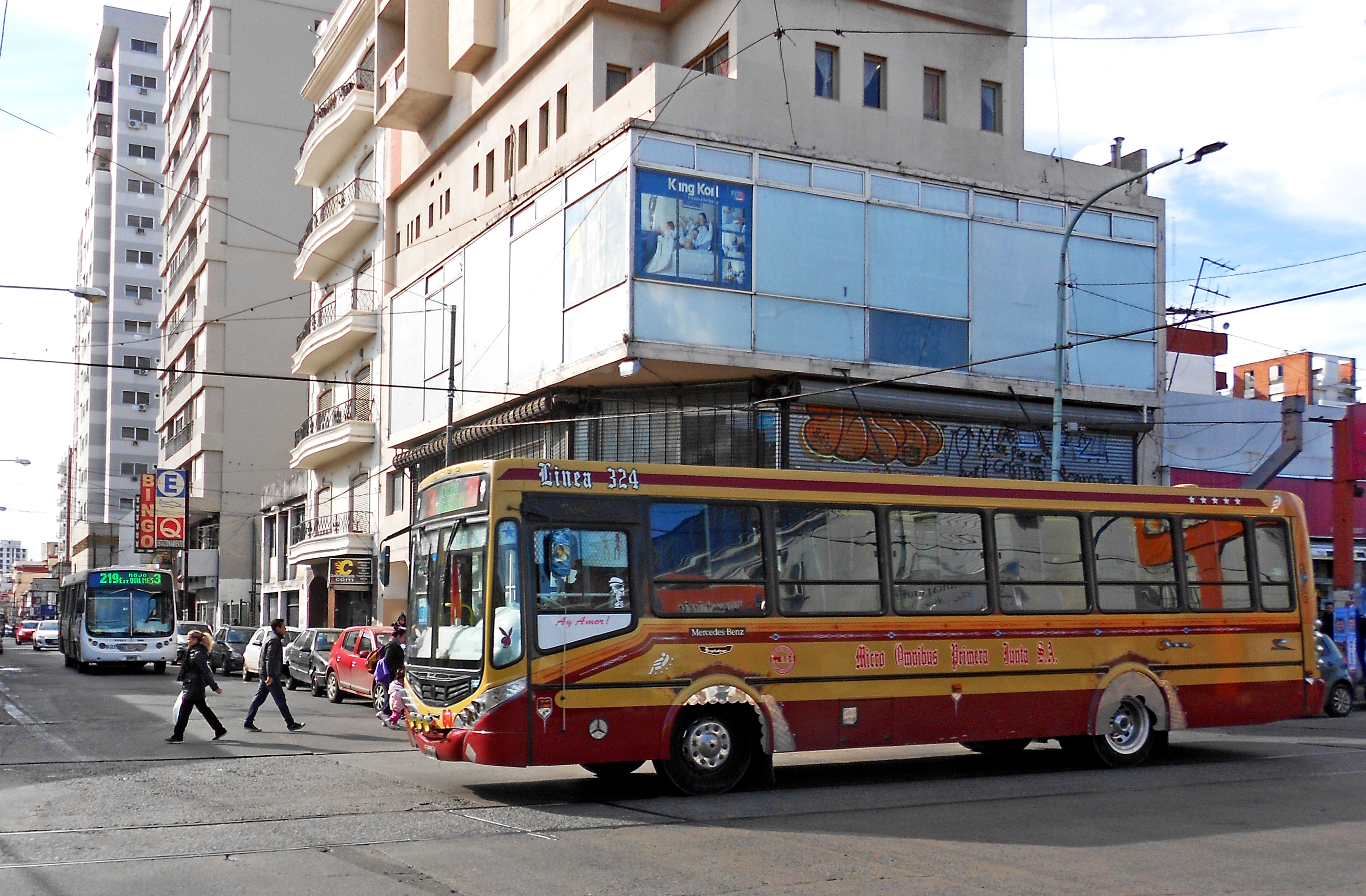 Interno de la línea 324 ramal 3, circulando por el centro de Quilmes.